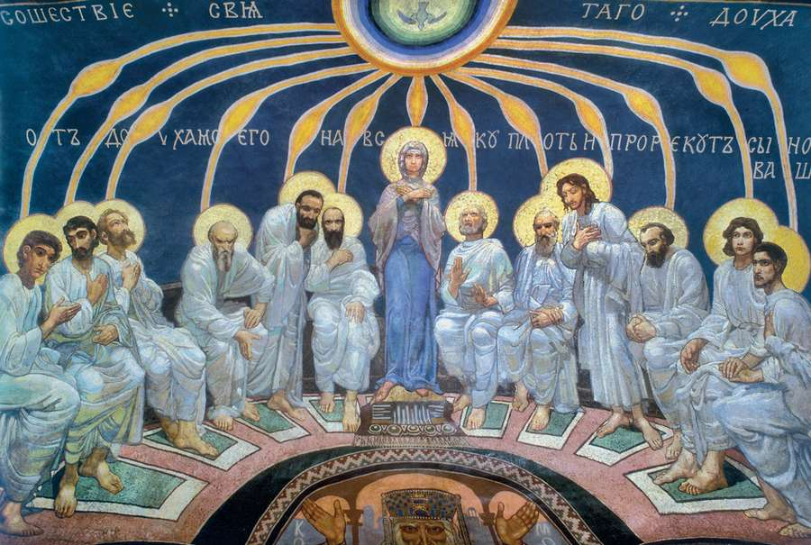 "Зішестя Святого Духа" (олія). М.О. Врубель. ХіХ ст.